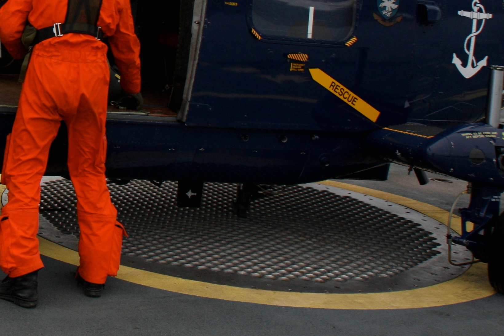 Harpun på Lynx helikopter